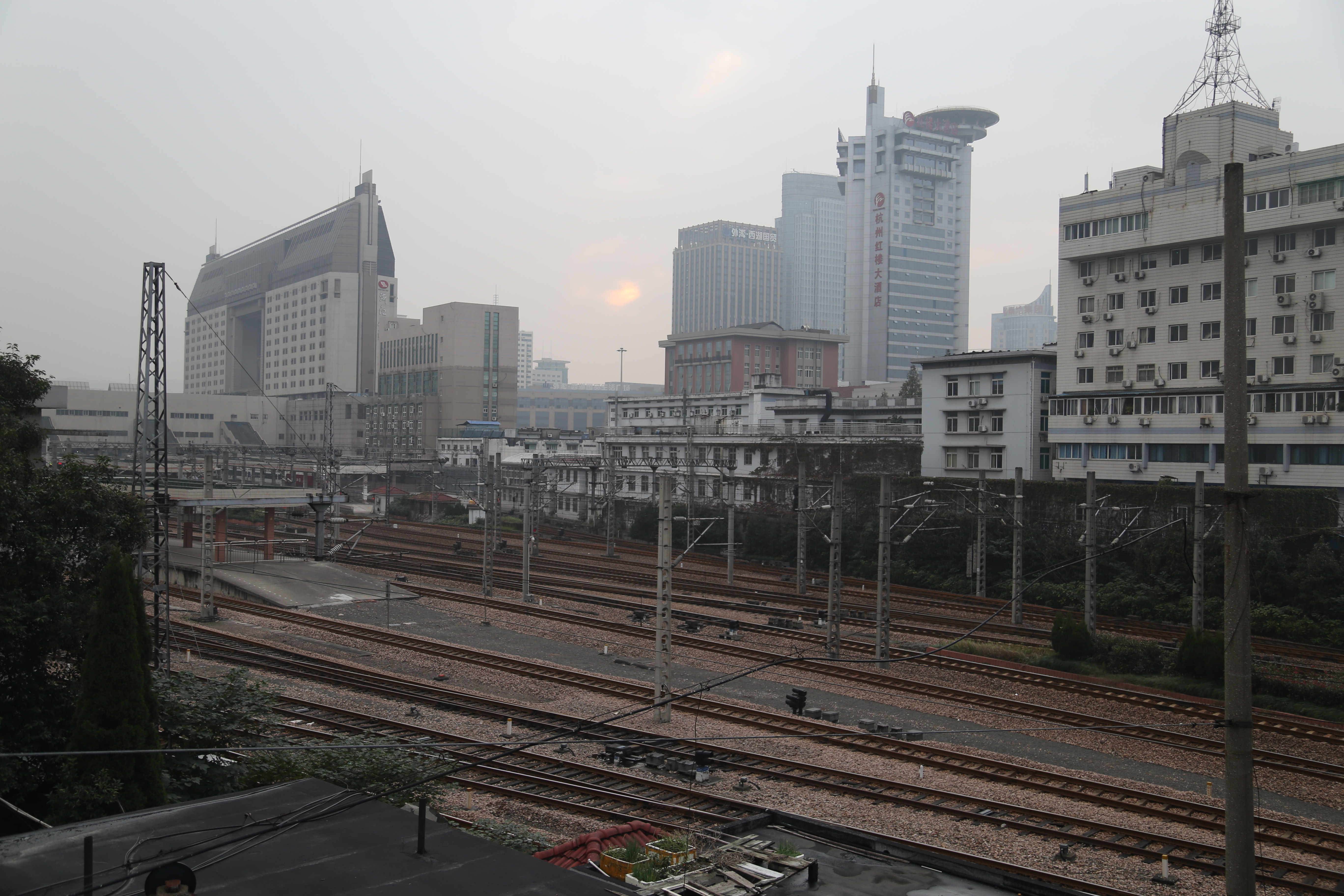 从清泰立交桥上远眺杭州站